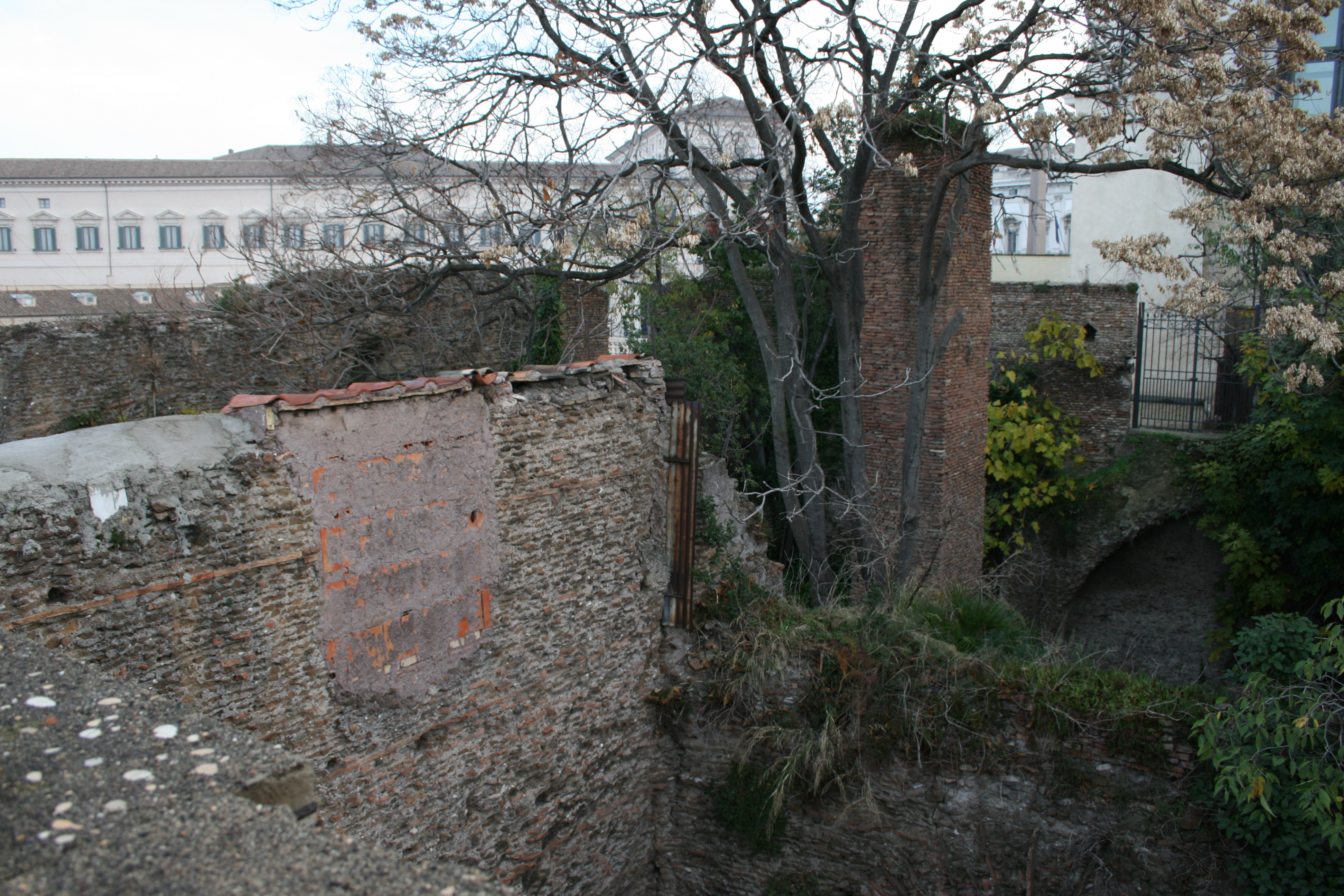 Pontificia Università Gregoriana Pontifical Gregorian University Roma / Rome uno degli edifici è il Tempio di Serapide (prospettiva verso Palazzo del Quirinale) one of the university buildings is an ancient Temple of Serapis (here seen looking towards Quirinal Palace) Author: P. J. Ehrat SJ PUG